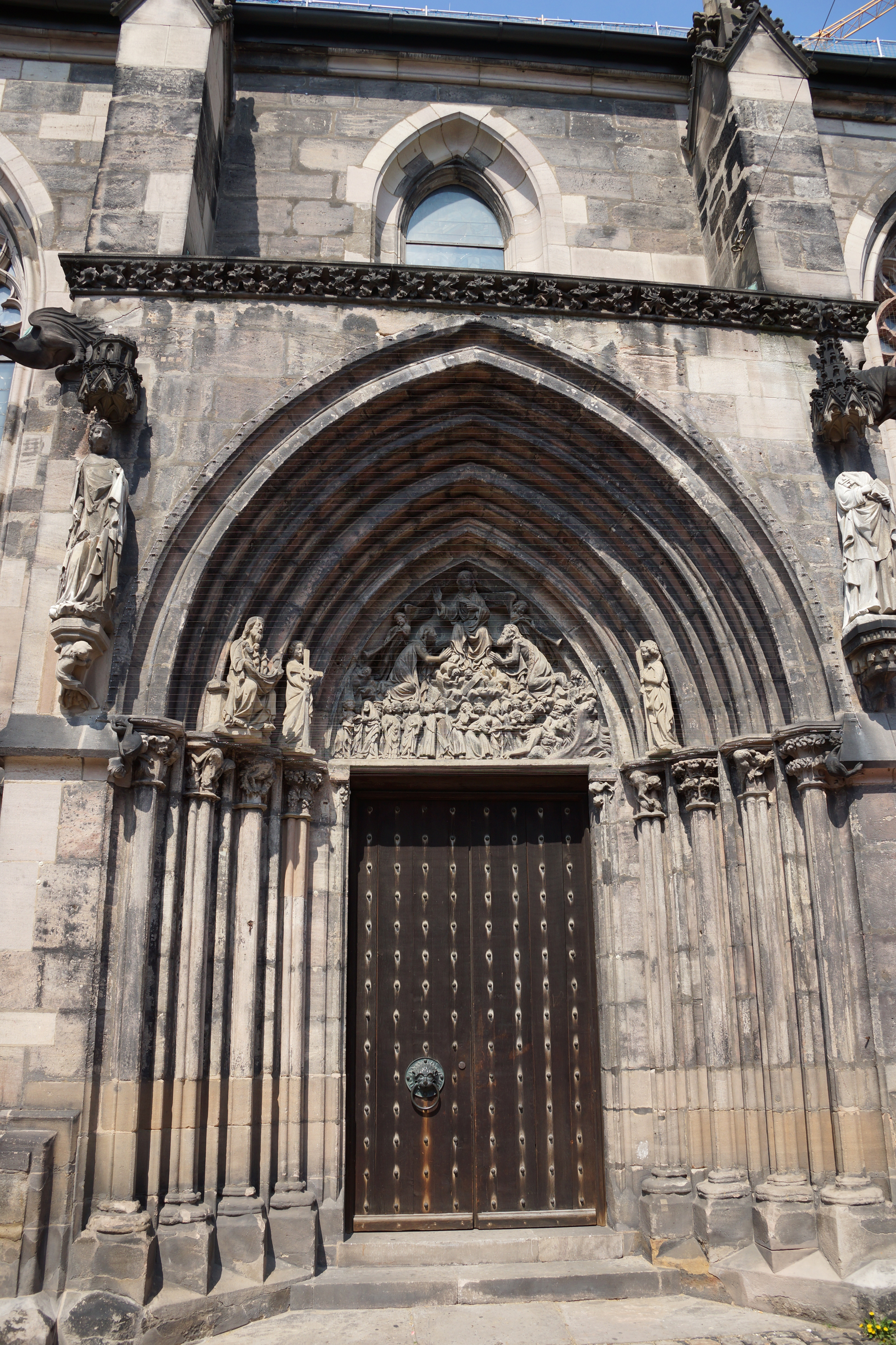 Die Sebaldus-Kirche in Nürnberg - Südfassade